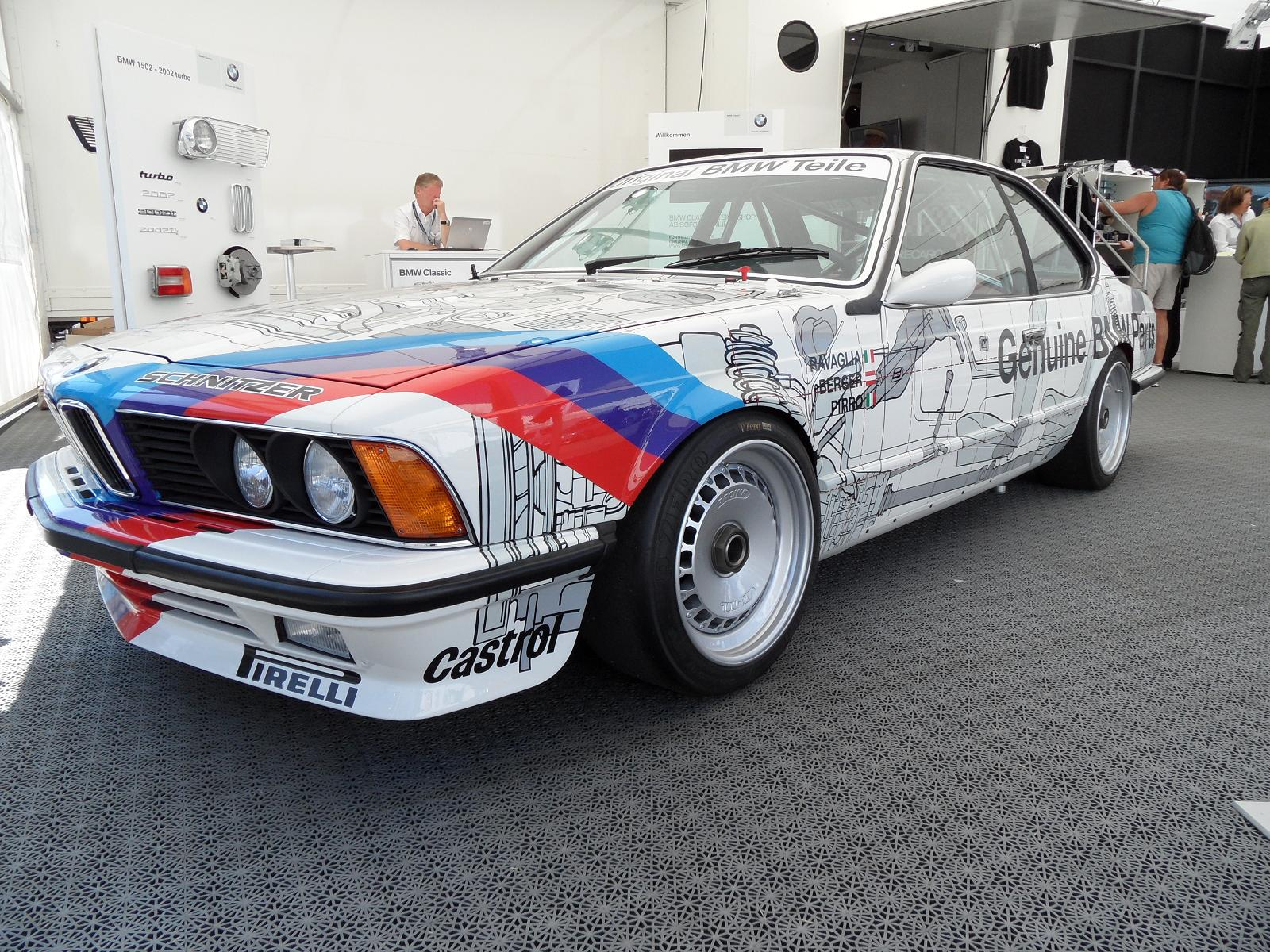 635 CSi Gruppe A Renncoupé im "Original BMW Teile"-Design, belegte 1986 bei den 24h von Spa mit den Fahrern Ravaglia/Berger/Pirro den dritten Platz, Fahrzeug wurde im Werksauftrag vom Team Schnitzer eingesetzt; erster Platz ebenfalls ein Schnitzer-635 mit Quester/Heger/Tassin